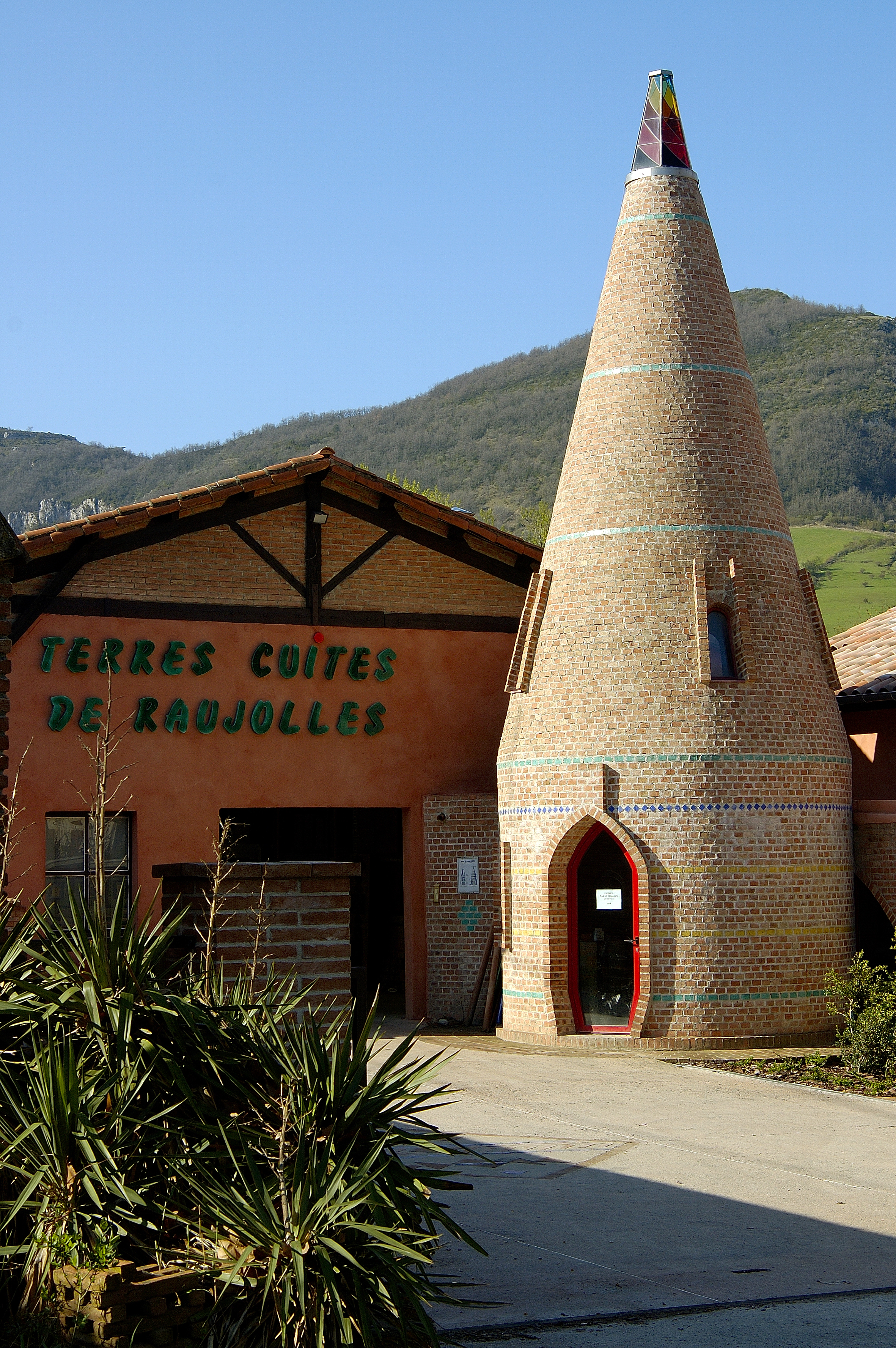 Cour de l'usine des Terres Cuites de Raujolles avec en premier plan la reproduction d'un four bouteille